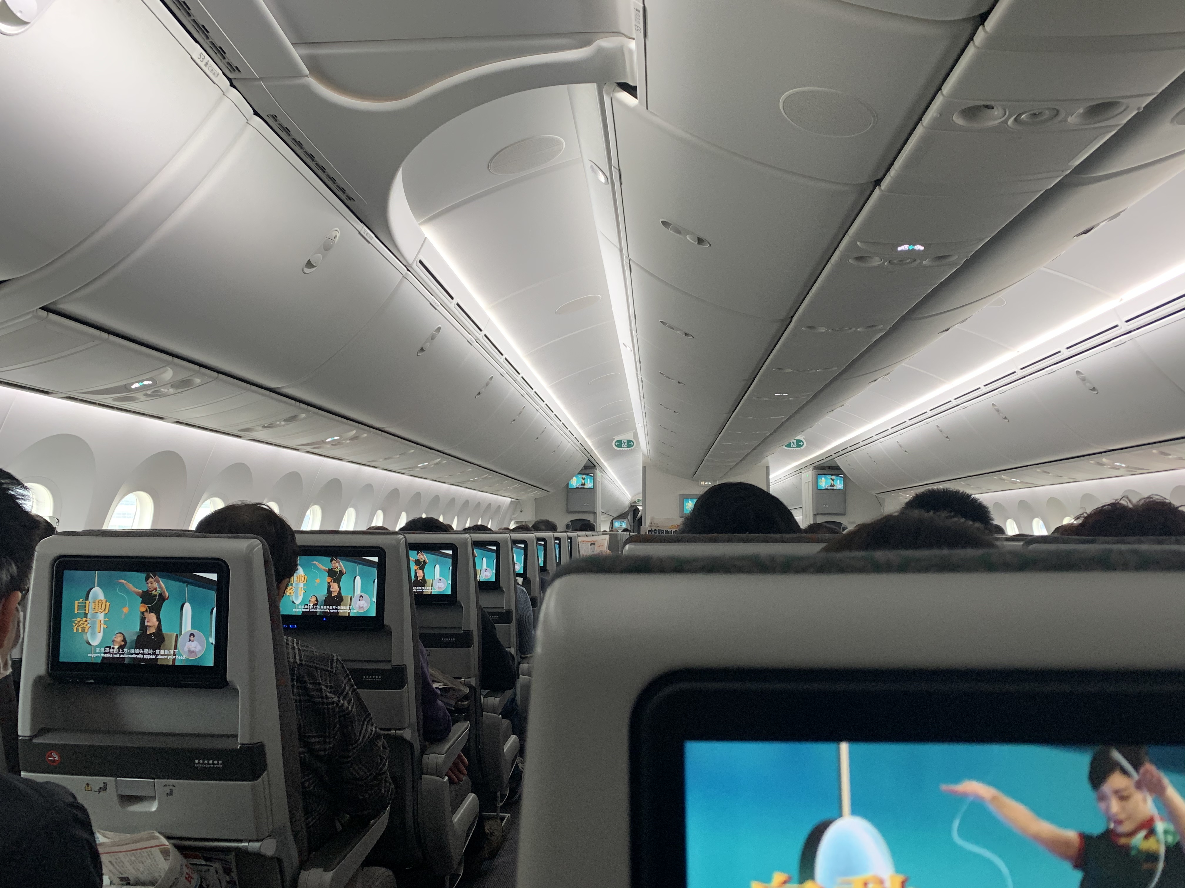 長榮航空波音787-9經濟客艙內景觀。